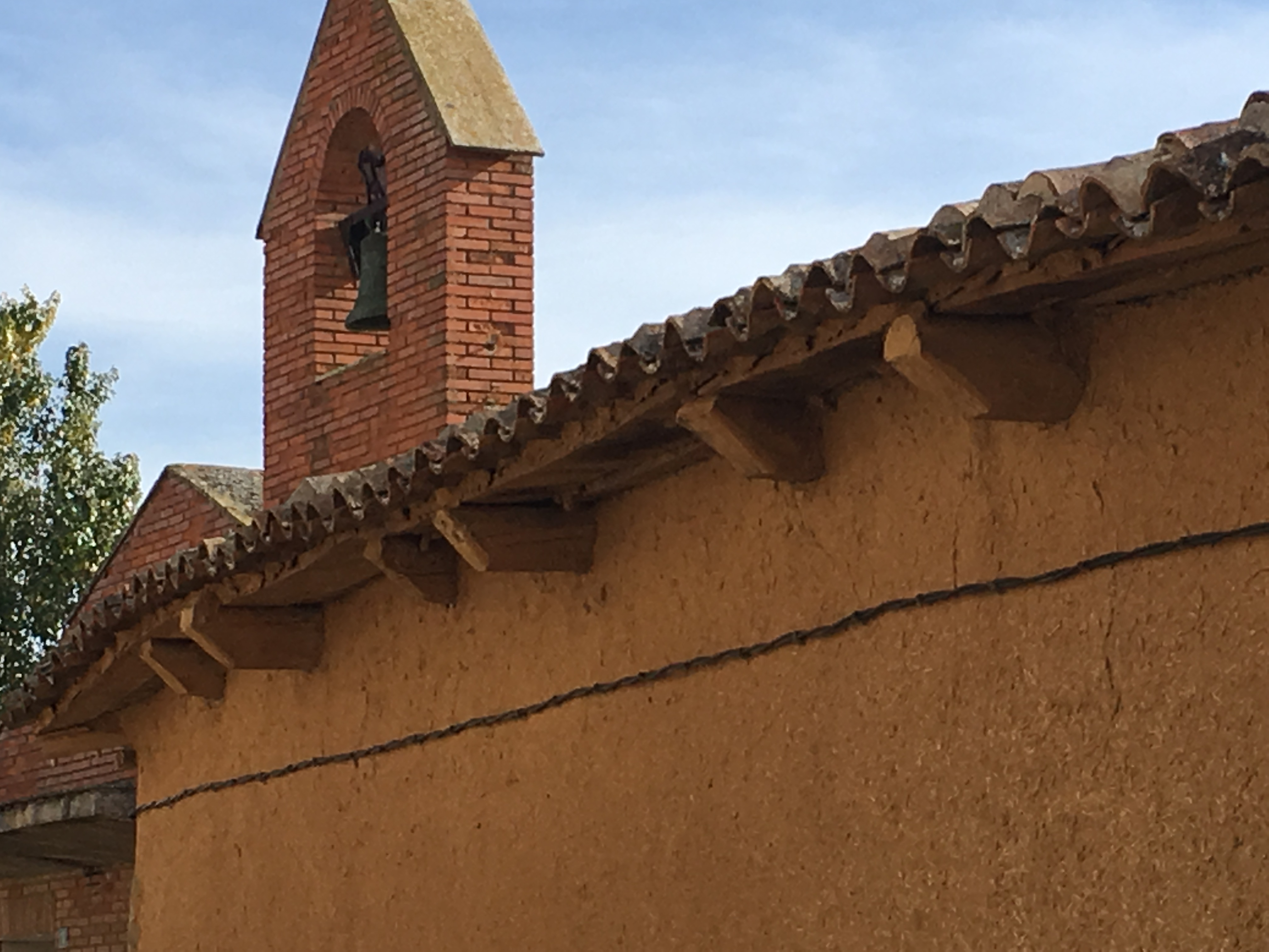 Villaesper Milenario